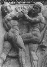 Imagem de Luta na jarra